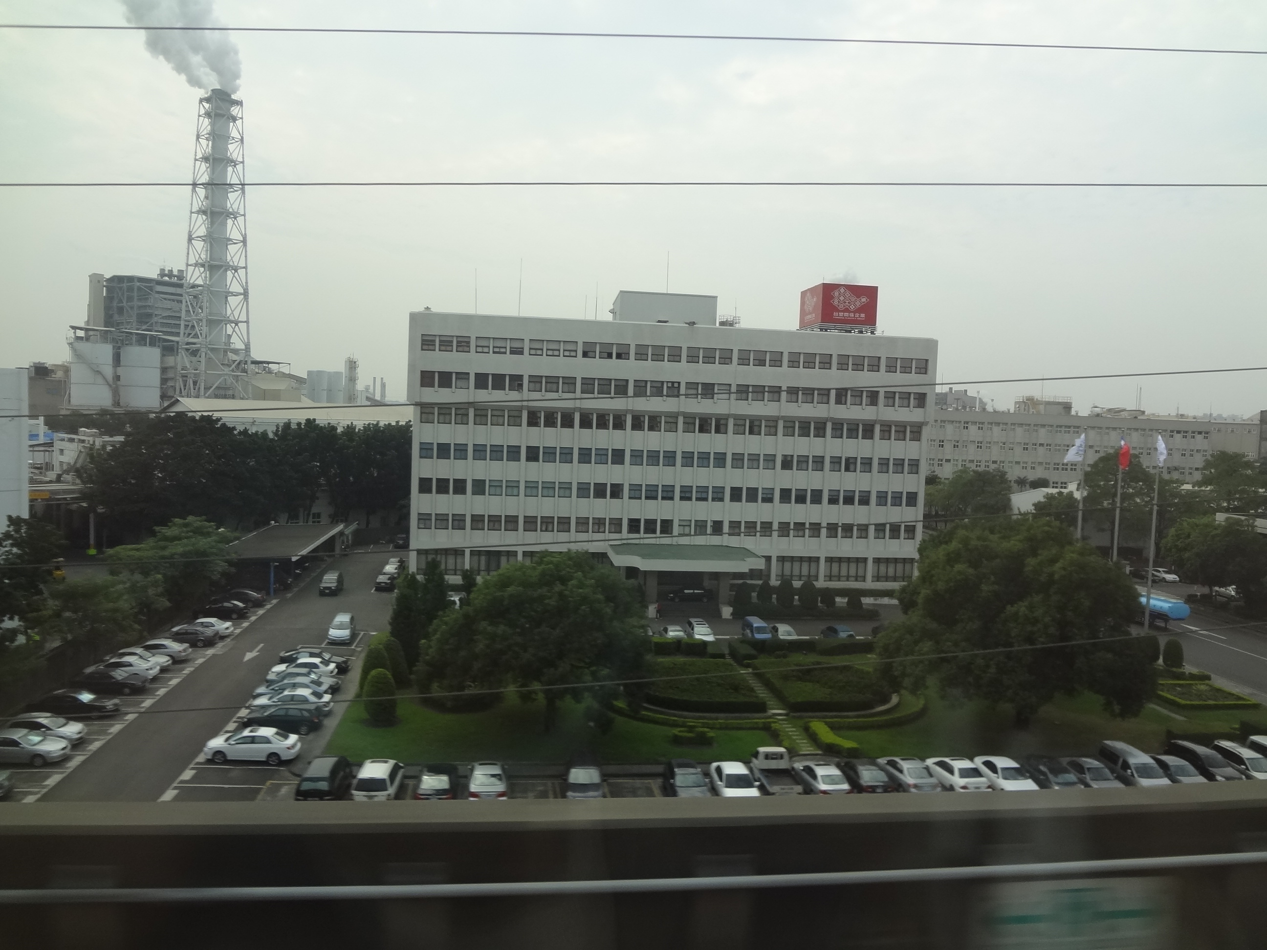 台灣塑膠工業公司仁武廠，位於臺灣高雄市仁武區水管路100號。本照片係於台灣高鐵南下列車上拍攝。